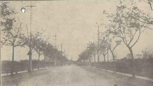 翻修完工后之上海谨记路